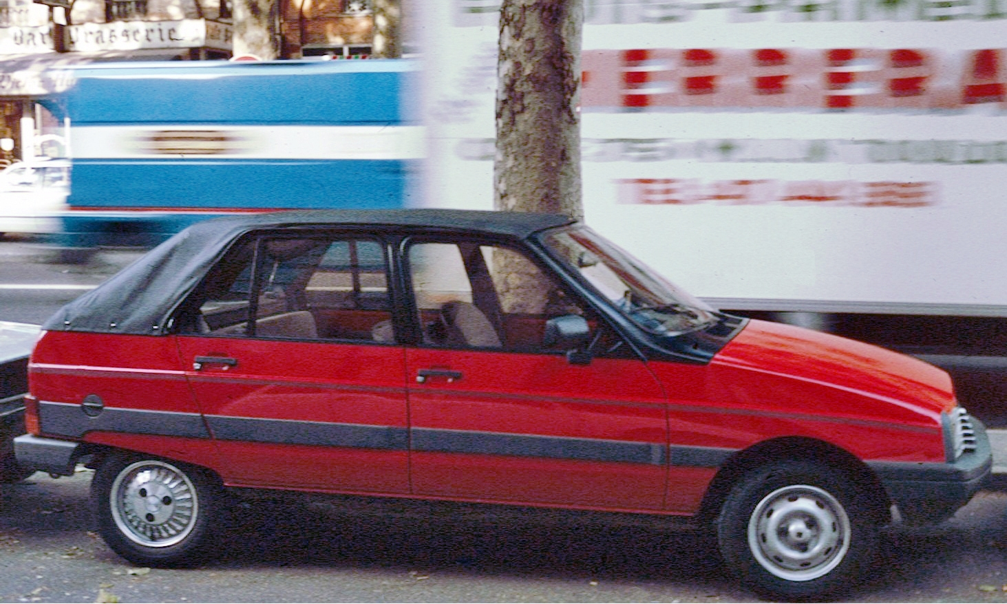 Citroen Visa découvrable à Rome de profil